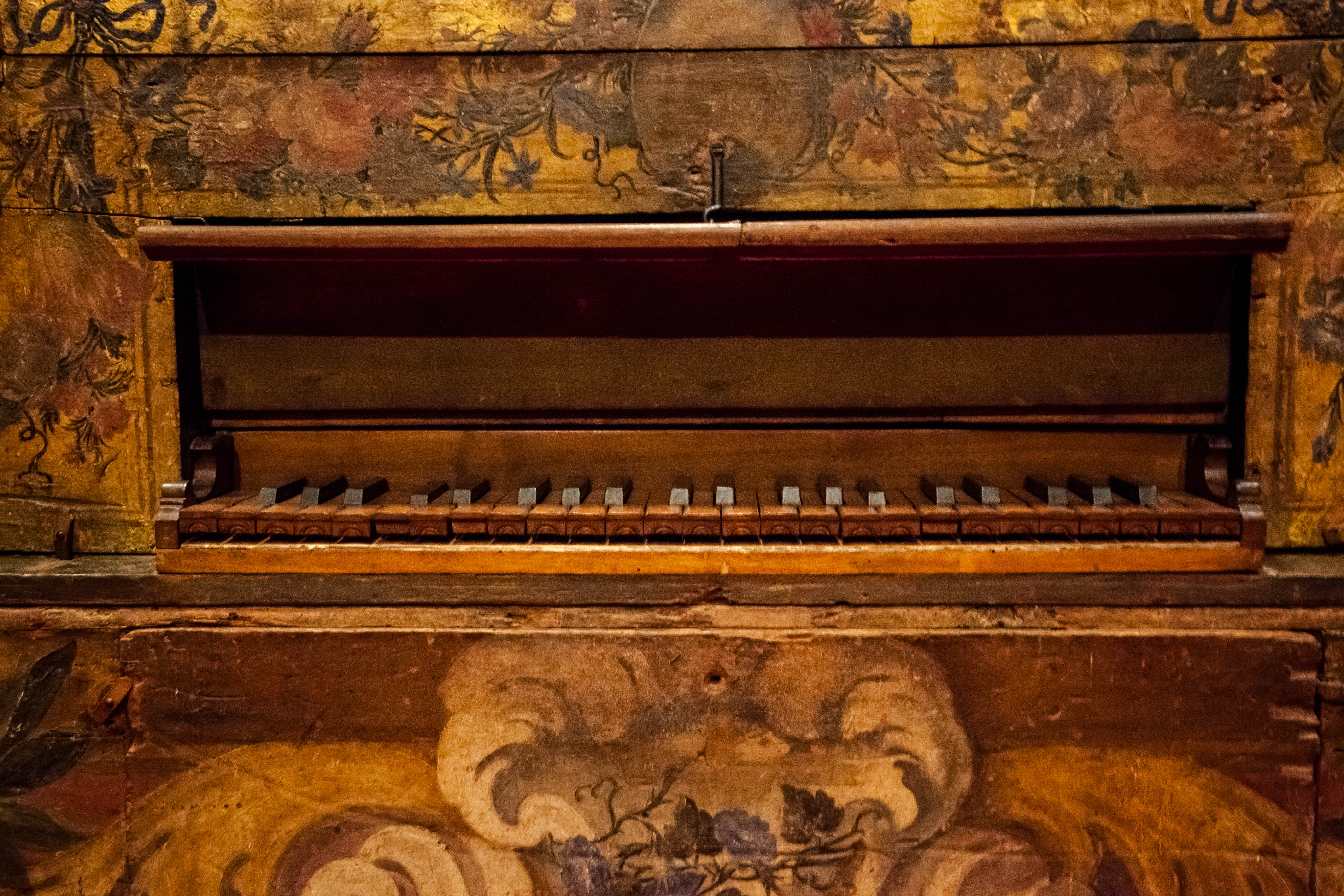 Orgue, detalls, Josep Boscà, MDMB 55